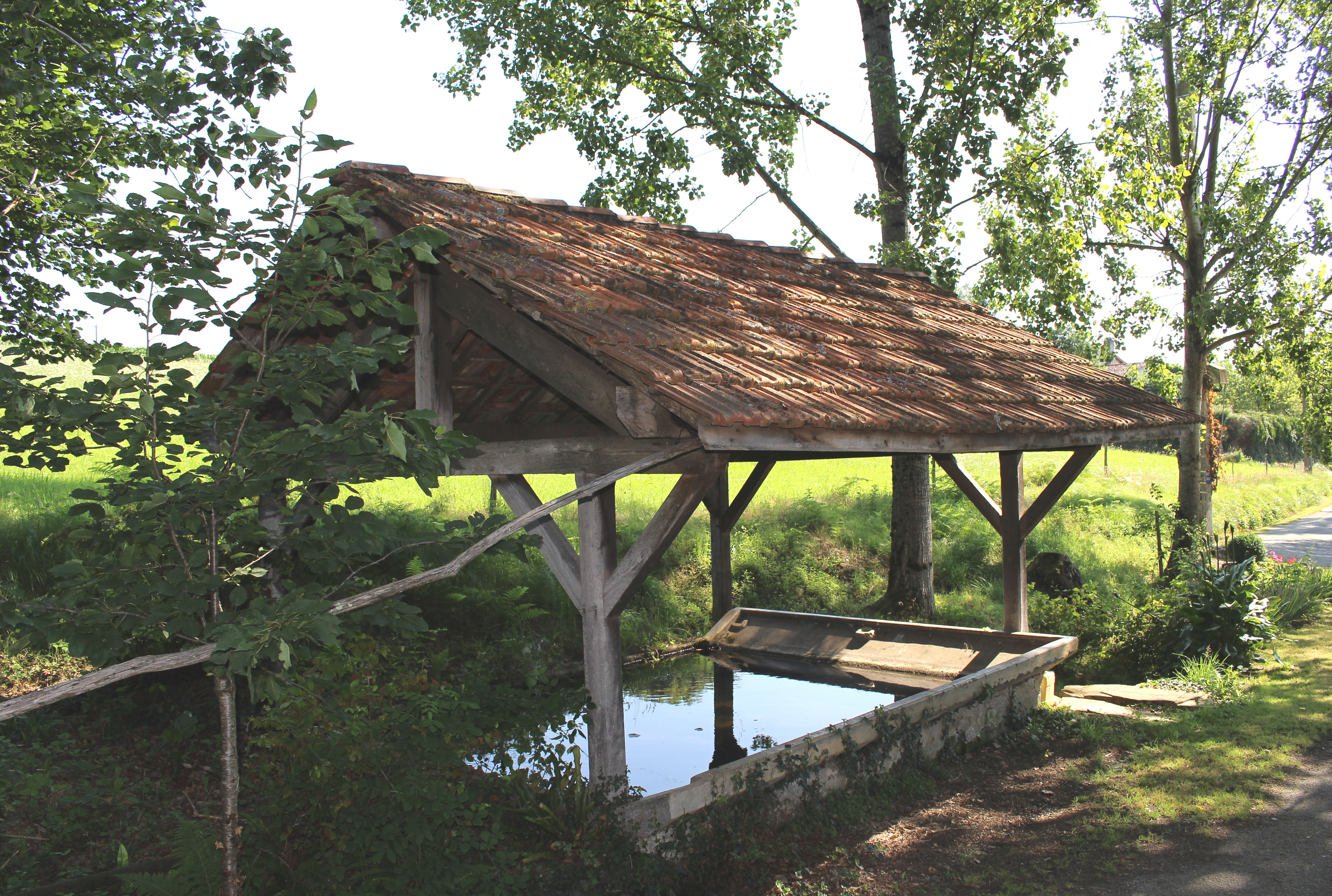 Lavoir de Bonrepos (Hautes-Pyrénées)